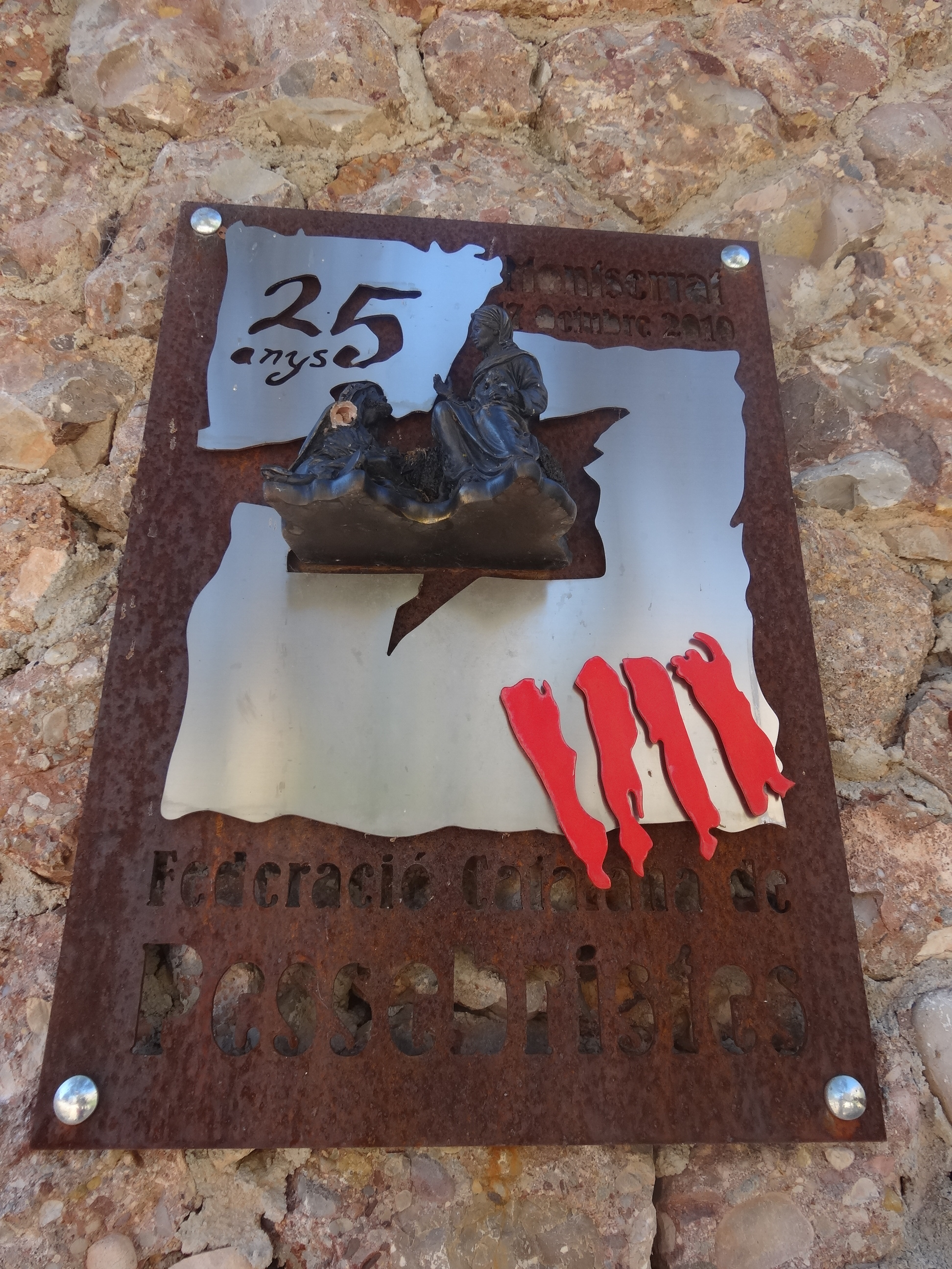 Escultures i monuments al camí de Sant Miquel, Montserrat. Placa commemorativa dels 25 anys de la Federació Catalana de Pessebristes (fundada el 1985), 17 d'octubre de 2010.